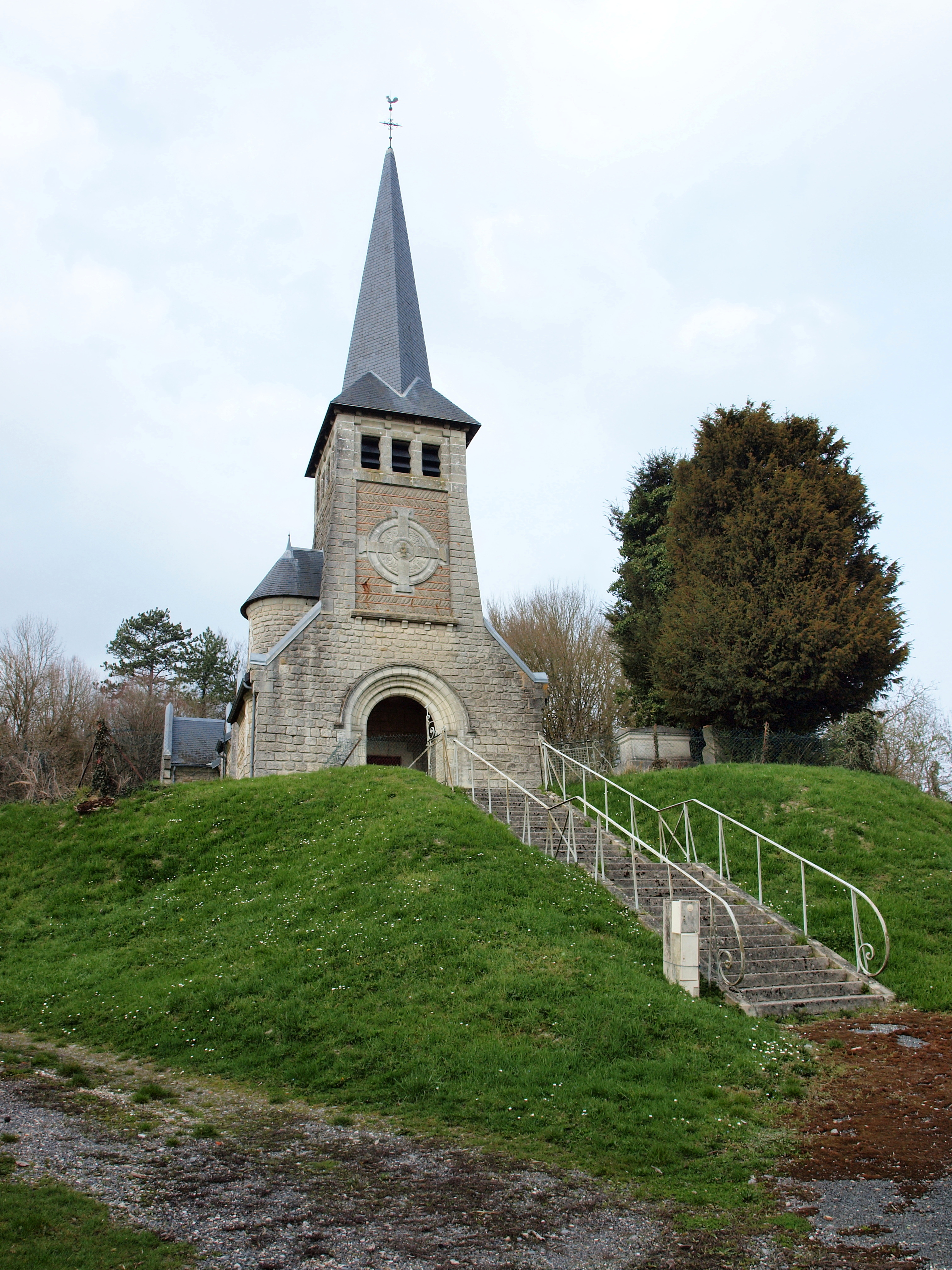 Fontaine-en-Dormois (Marne, France)